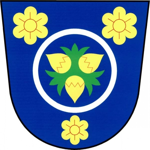 Znak, Leština, okres Šumperk